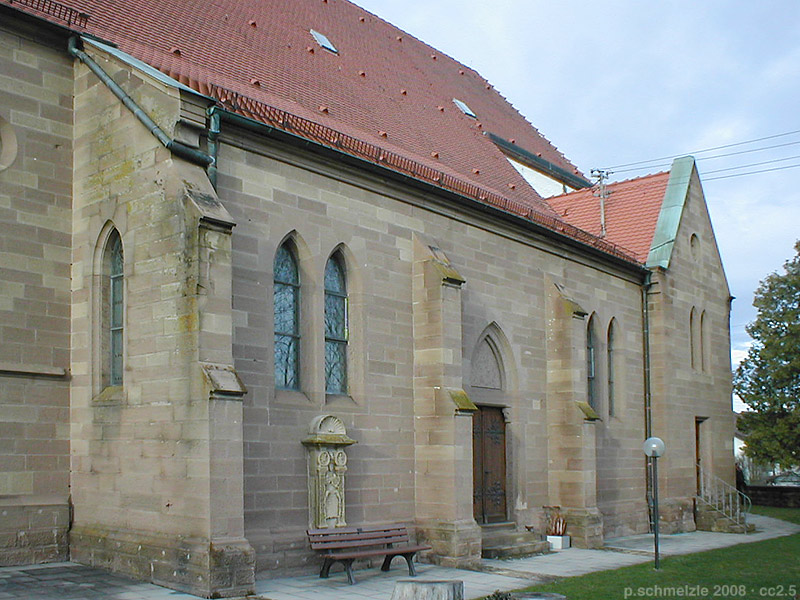 St.-Ulrichs-Kirche in Brackenheim-Stockheim, Südfassade